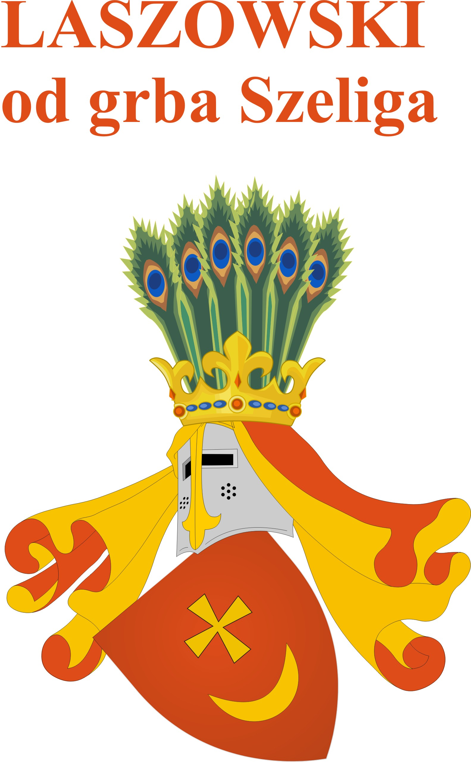 Grb obitelji Laszowski od grba Szeliga